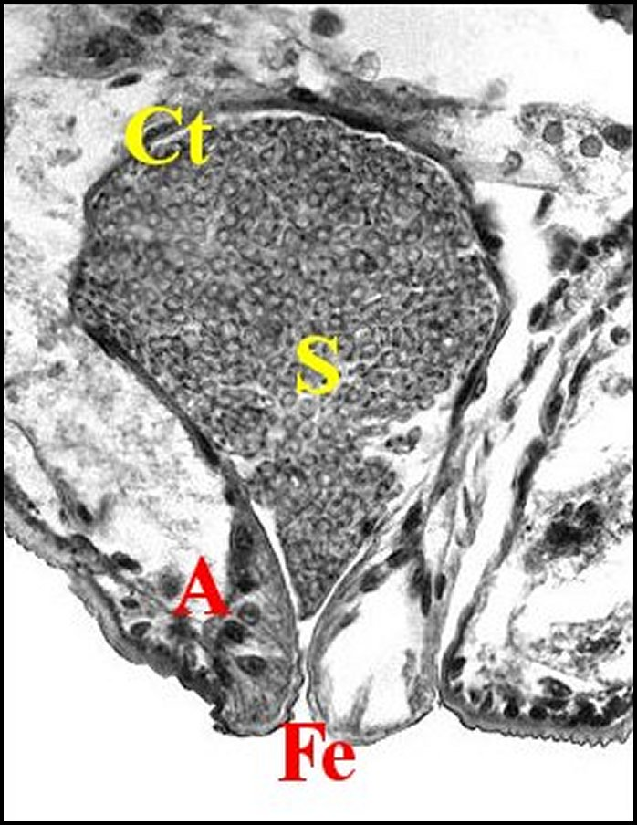 Spermatozoïdes emplissant le canal commun terminal d'un mâle de Mastophora venant de sortir du cocon.